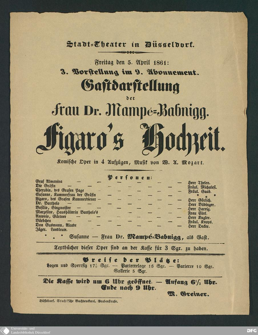 Theaterzettel des Stadttheaters Düsseldorf zu einer Vorstellung vom 5. April 1861